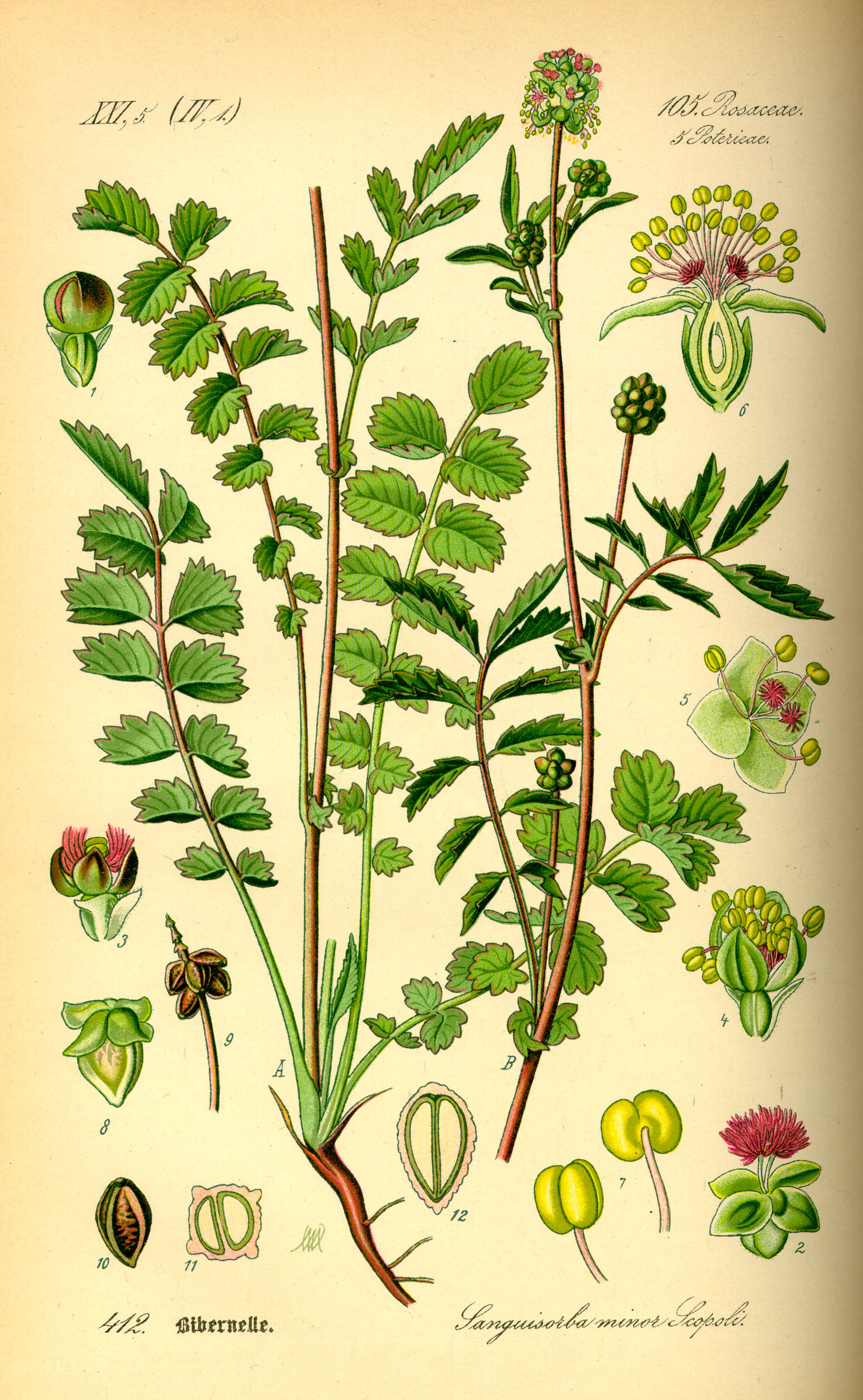 Petite pimprenelle